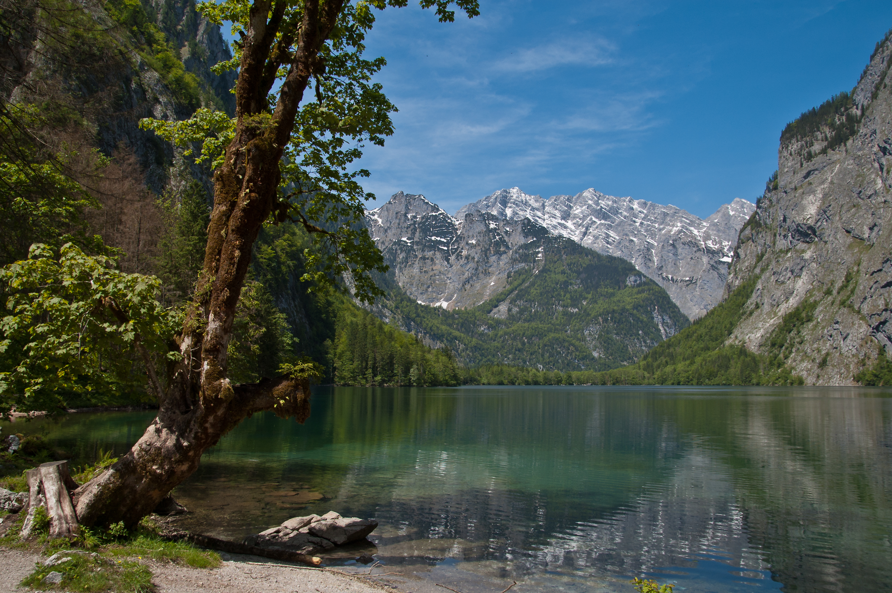 Blick vom südöstlichen Ufer des Obersees über diesen zum Watzmannmassiv